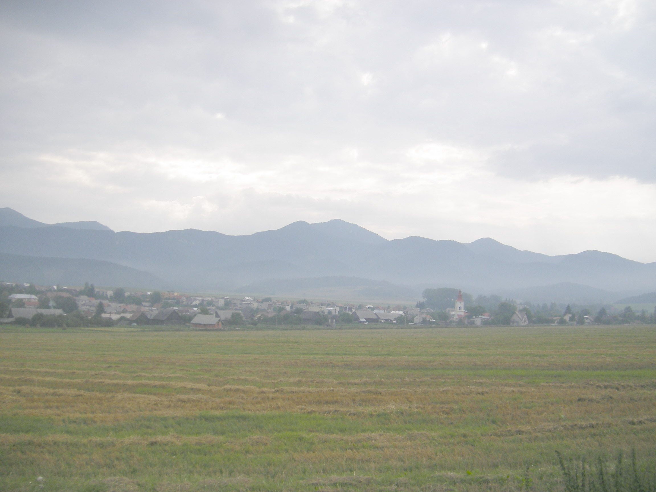 Mošovce, okres Turčianske Teplice